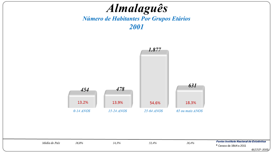 População